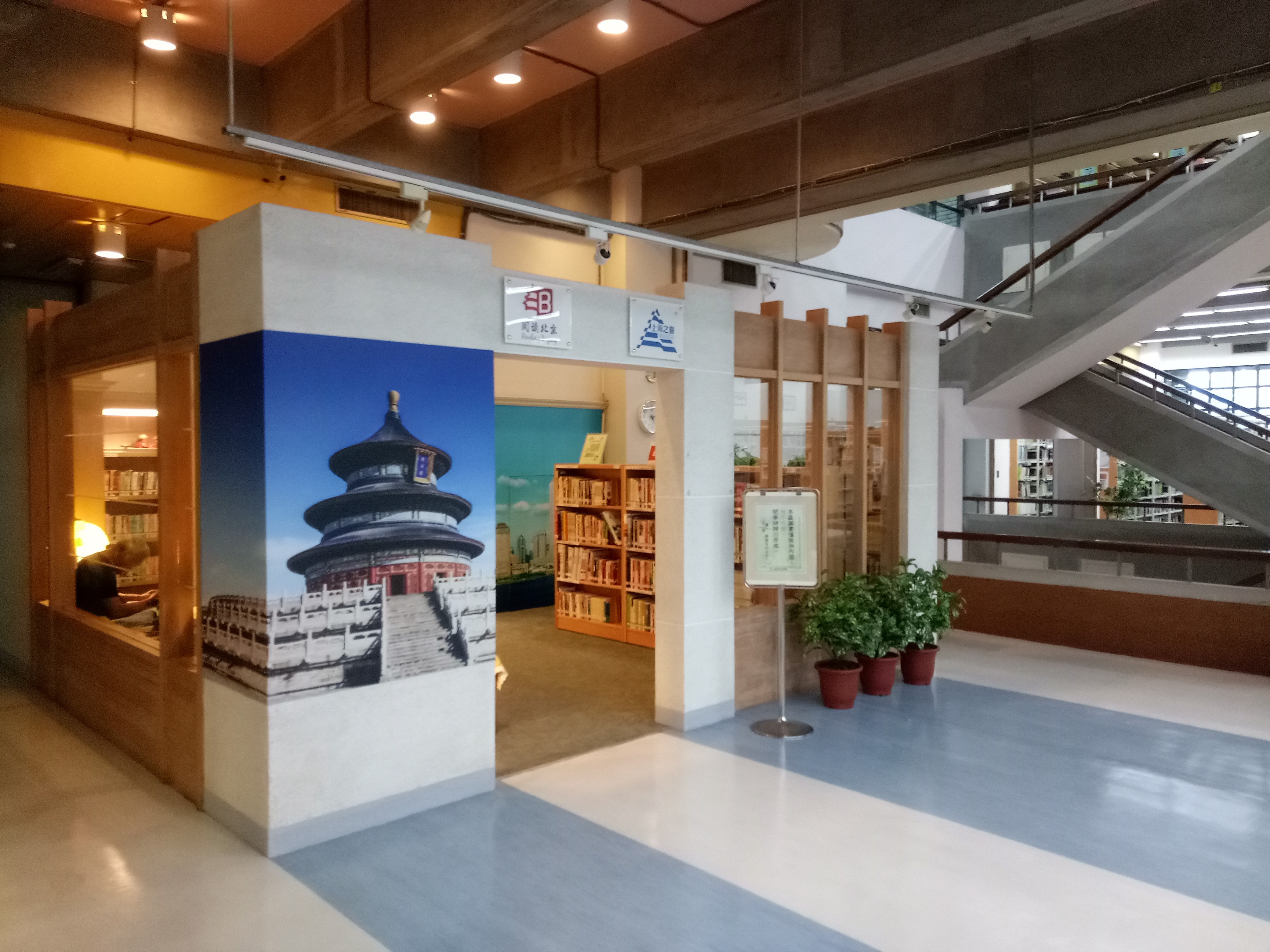 臺北市立圖書館總館 閱讀北京 上海之窗